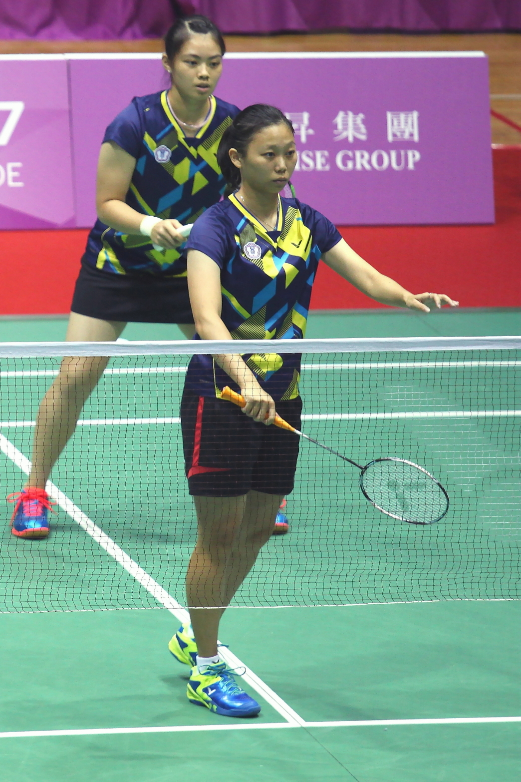 2017 臺北世大運混團女雙 吳玓蓉 01